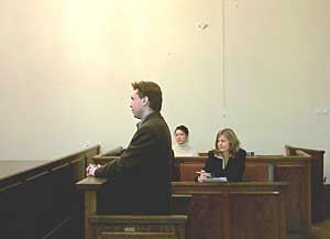 Robert Strąk zeznaje przed Sądem Rejonowym w Gdańsku podczas rozprawy Doroty Nieznalskiej 13 stycznia 2003 r.